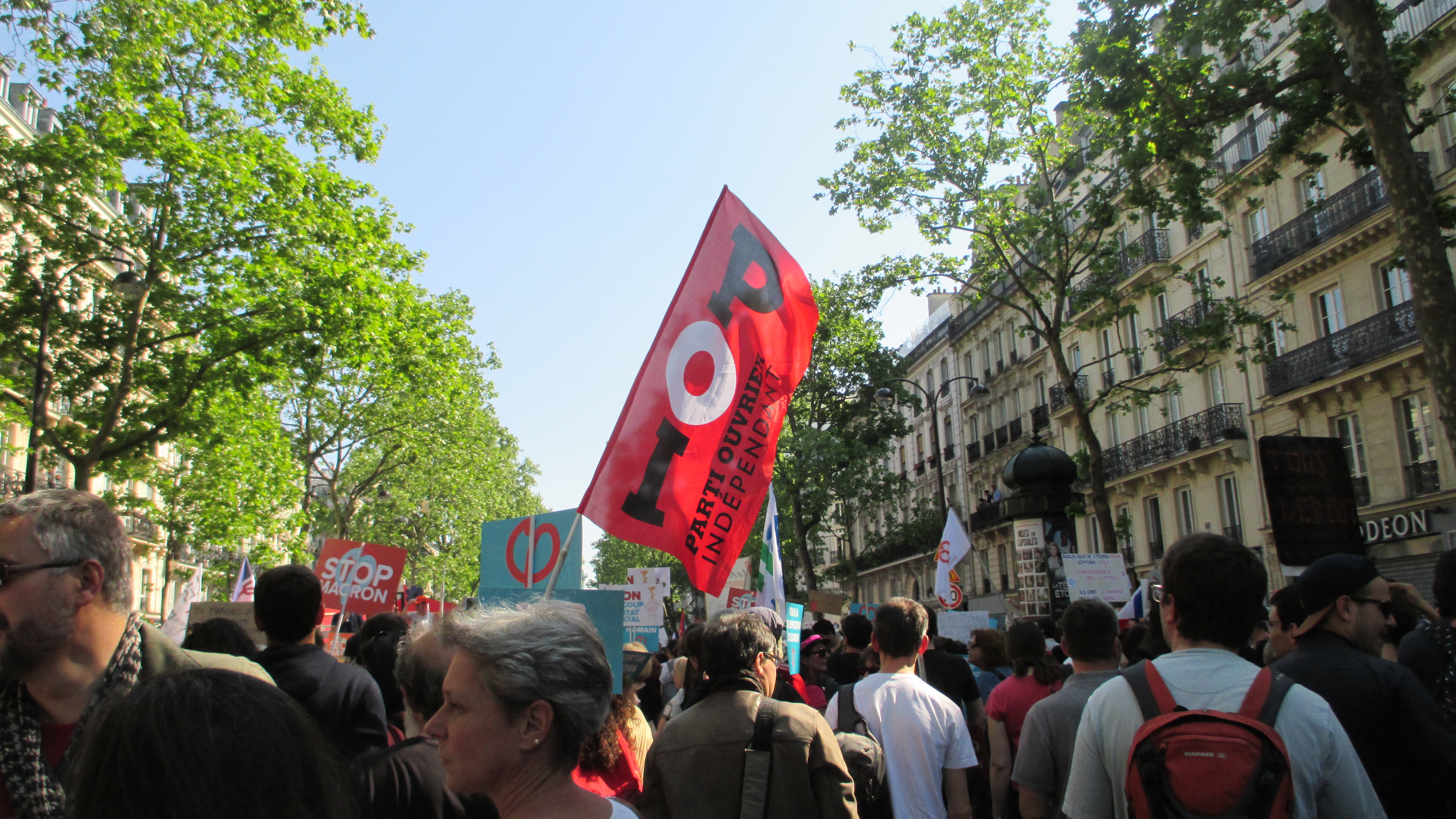 Drapeau du POI à la manifestation du 5 mai 2018 La fête à Macron, parcours d'Opéra à Bastille.